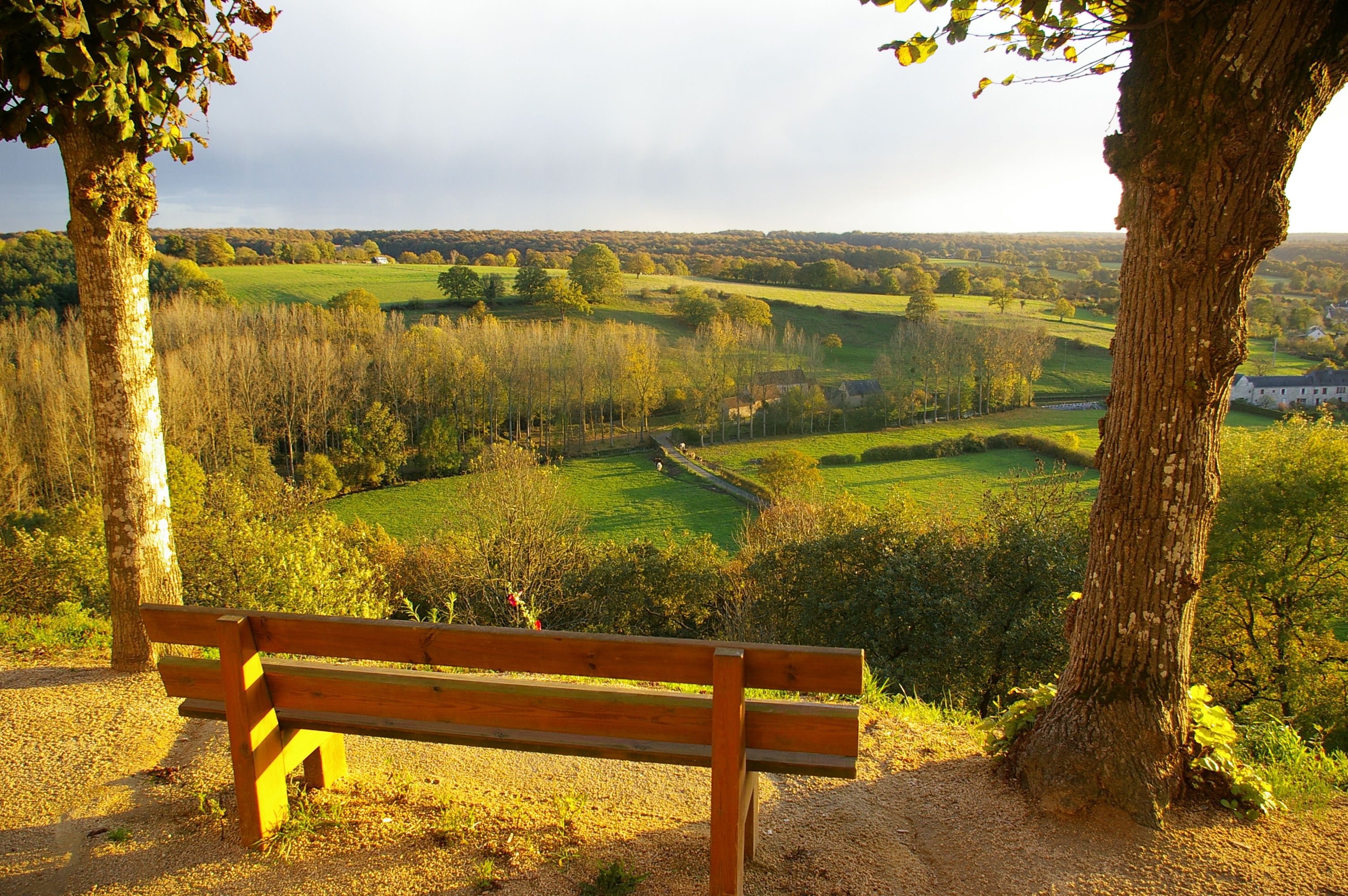 PaysageCoevrons